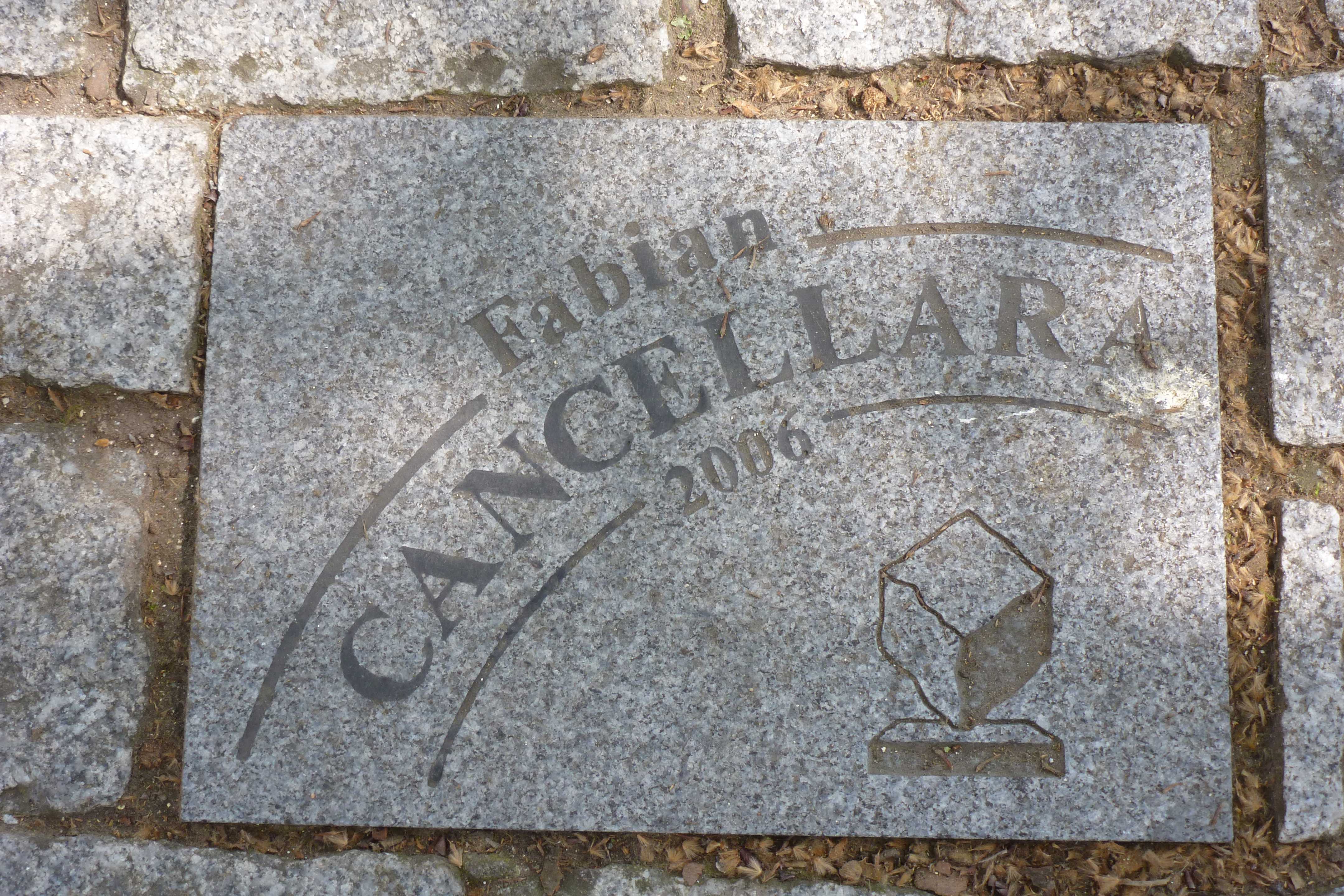 Pflasterstein für Fabian Cancellara auf der Allee Charles Crupelandt in Roubaix